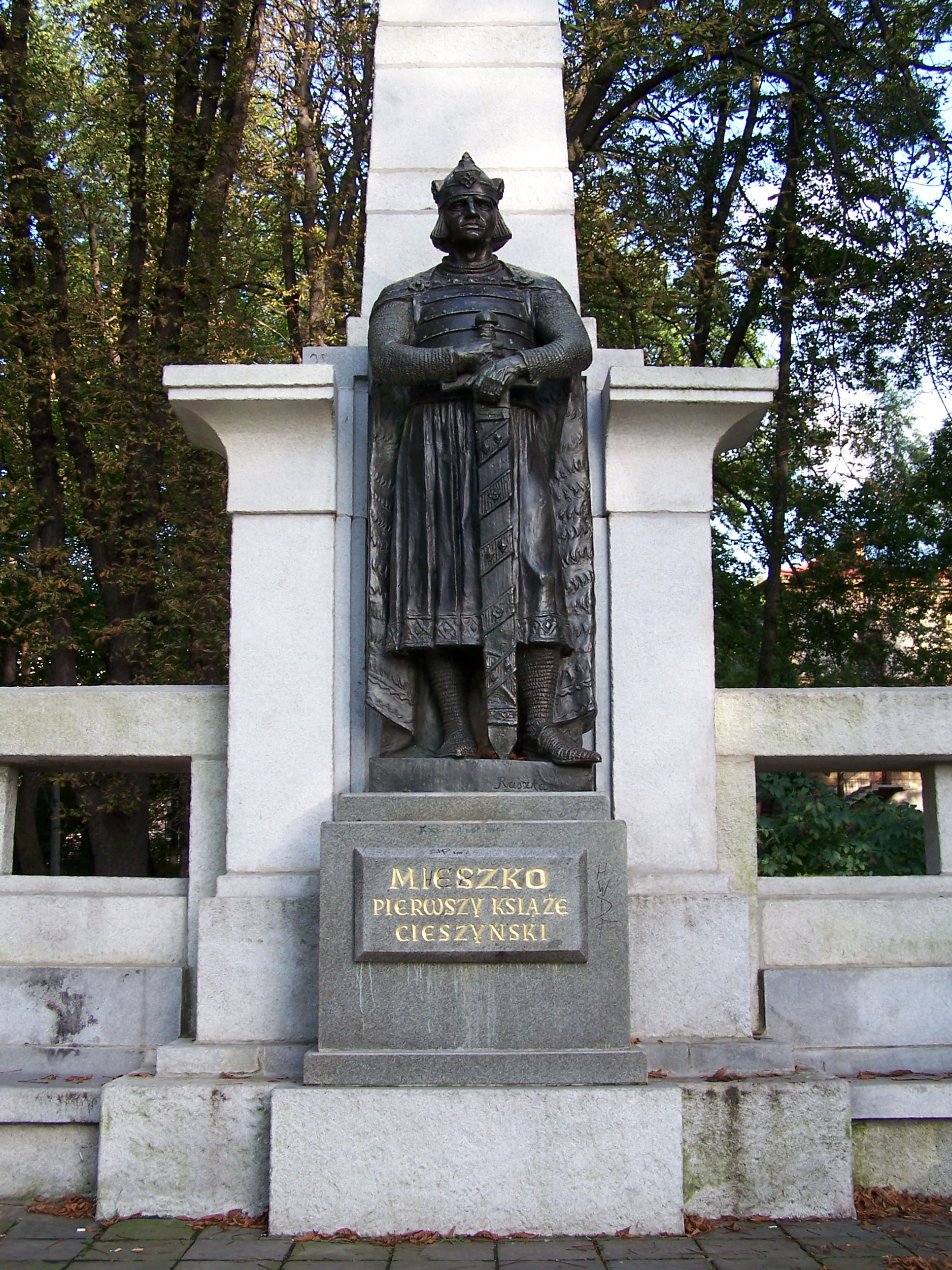 Mieszko I monument in Cieszyn, Poland